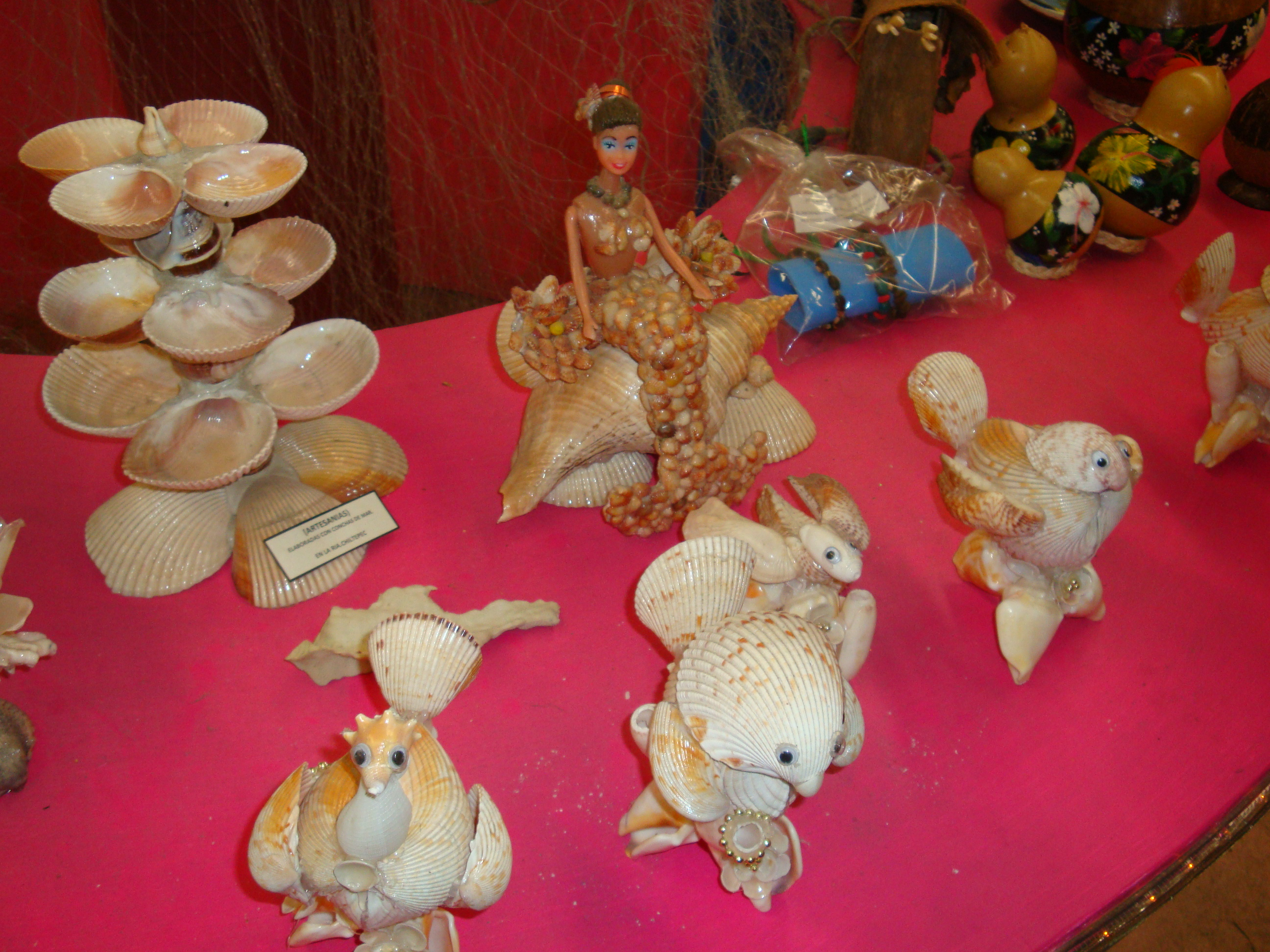 Figuras elaboradas de conchas marinas. Artesanía típica del municipio de Paraíso, Tabasco, México.